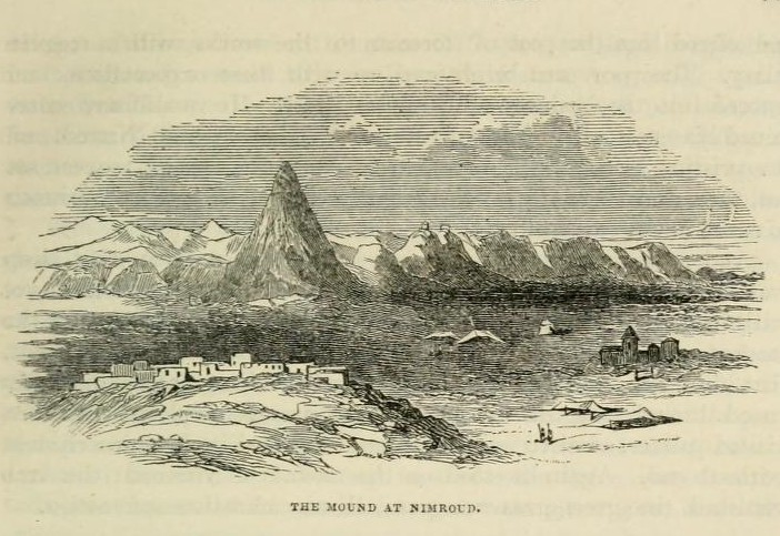 Die Hügel von Nimrod mit TELL